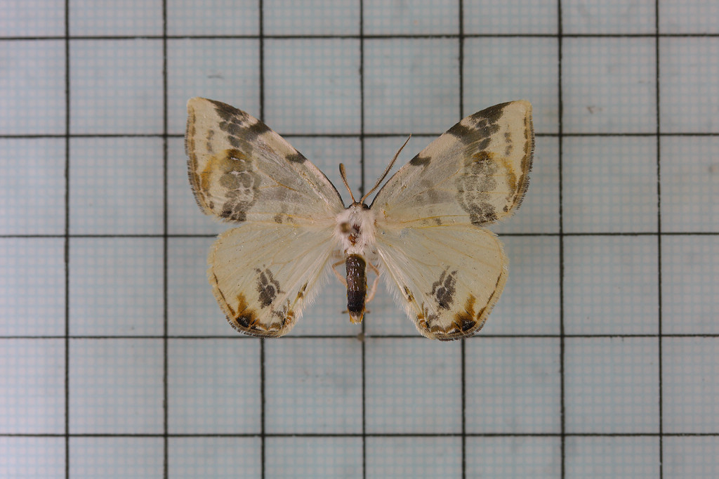 Sewa taiwana (Wileman, 1911) 台灣波紋鉤蛾 鞍2 P.33,Pl.38-14